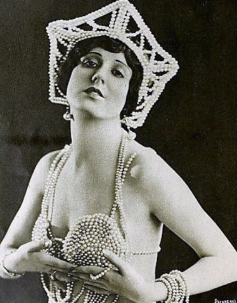 Derelys Perdue